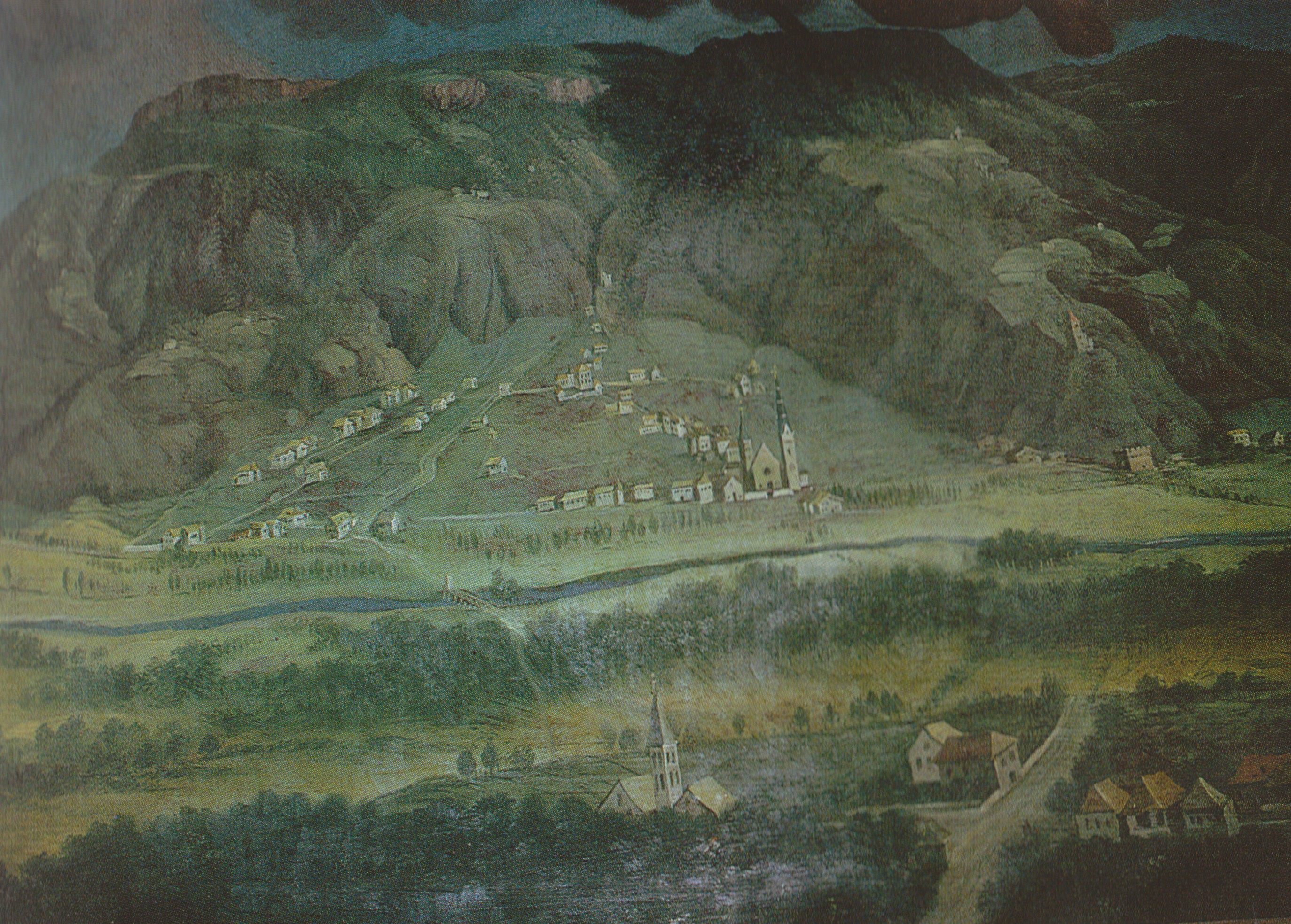 Ansicht von Terlan. Altarbild von Christoph Anton Mair in der Johann Nepomuk Kapelle bei Liebeneich, 1771